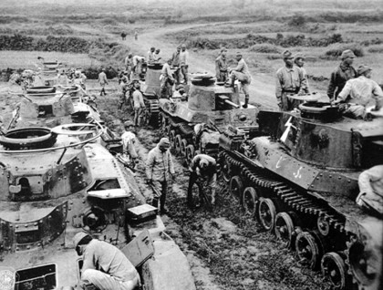 97식 전차도 포함됨